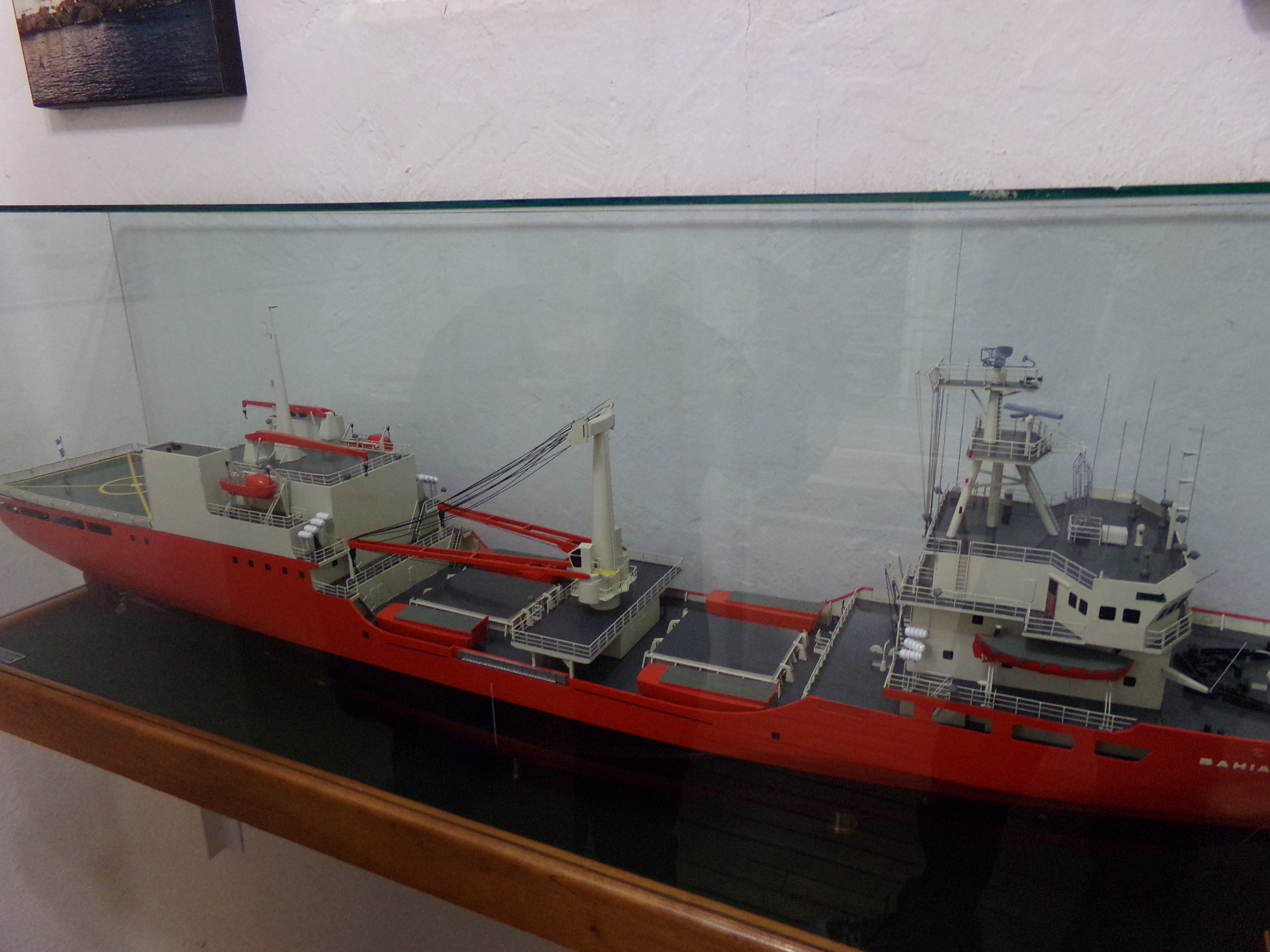 Museo Maritimo y Ex Presidio de Ushuaia, TDF, Arg